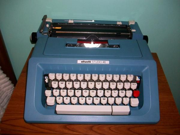 Maquina de escreber Olivetti Studio 46 com tastiera espanhola